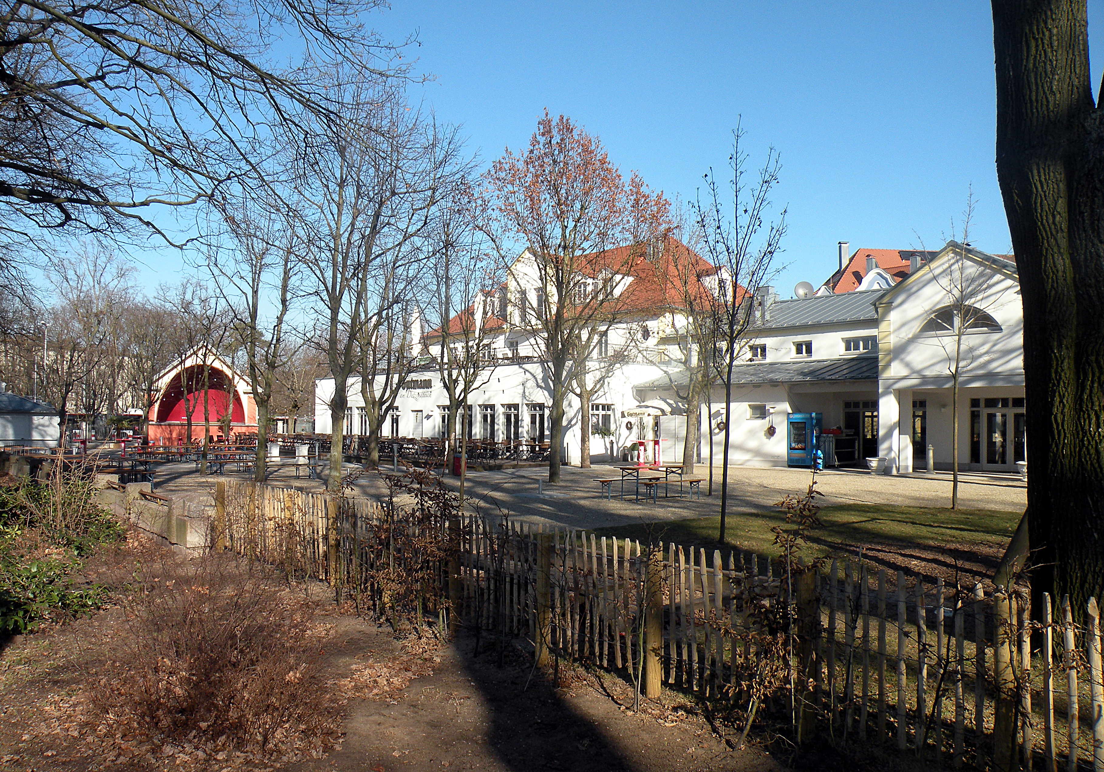 Парк-кафе.